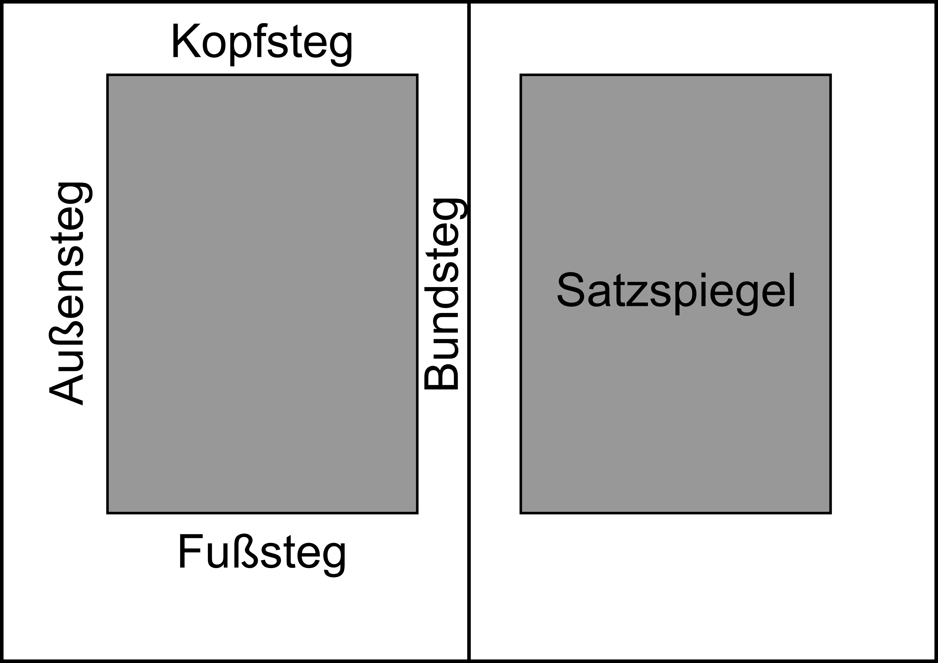 Bezeichnung der Ränder. Auflösung: 300dpi